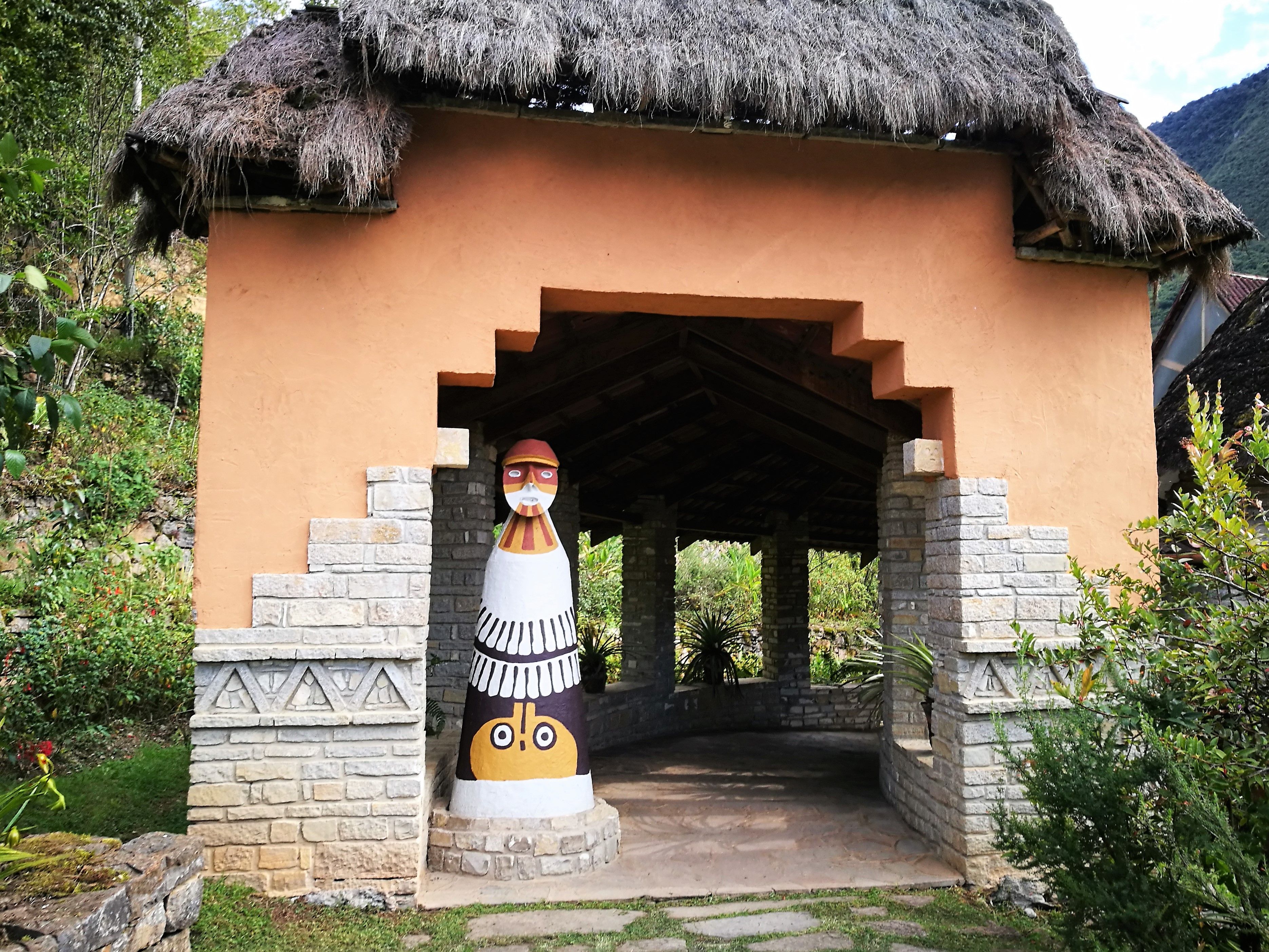 Part dels jardins del museu de Leimebamba